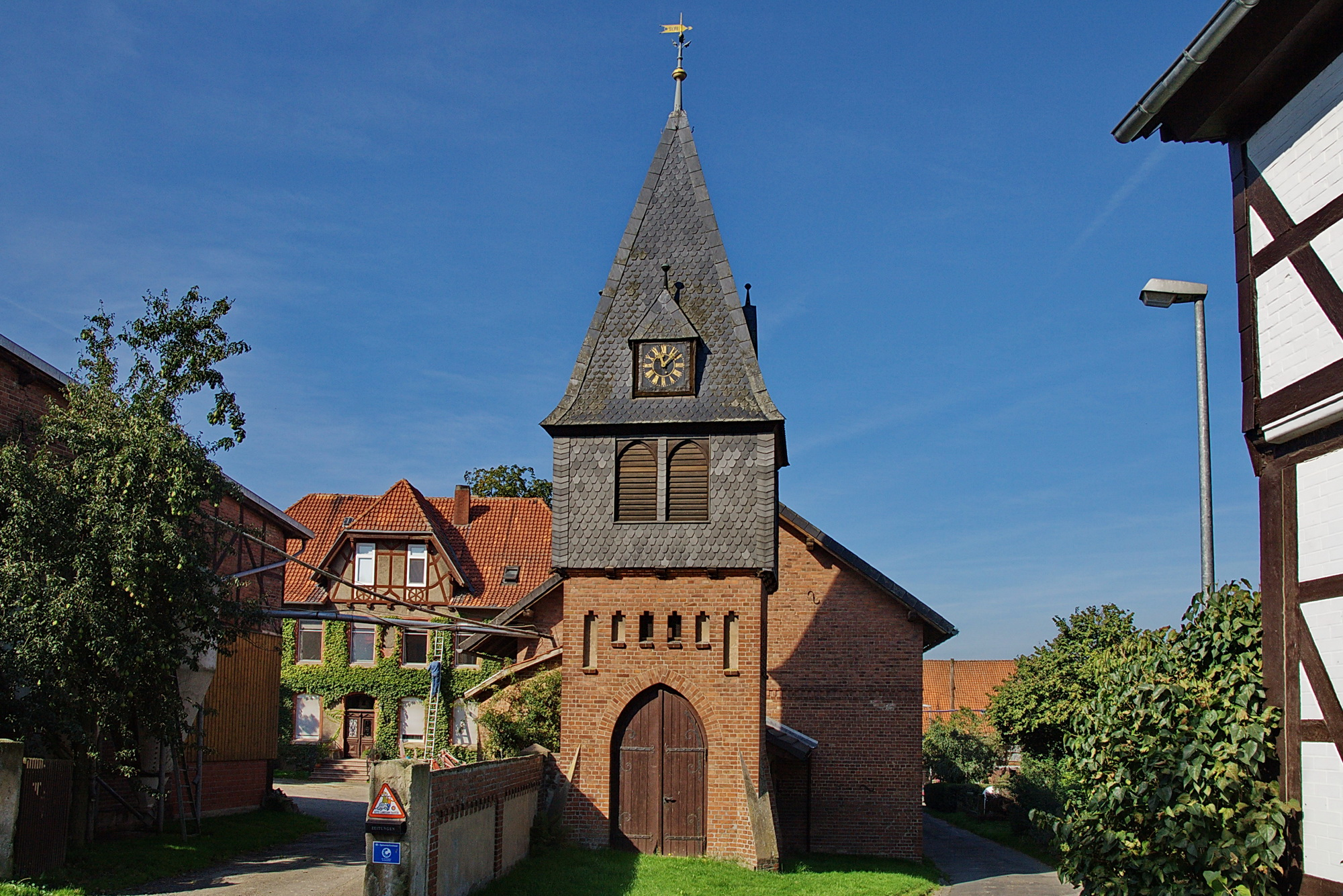 Kapellenturm in Andershausen (Einbeck), Niedersachsen, Deutschland